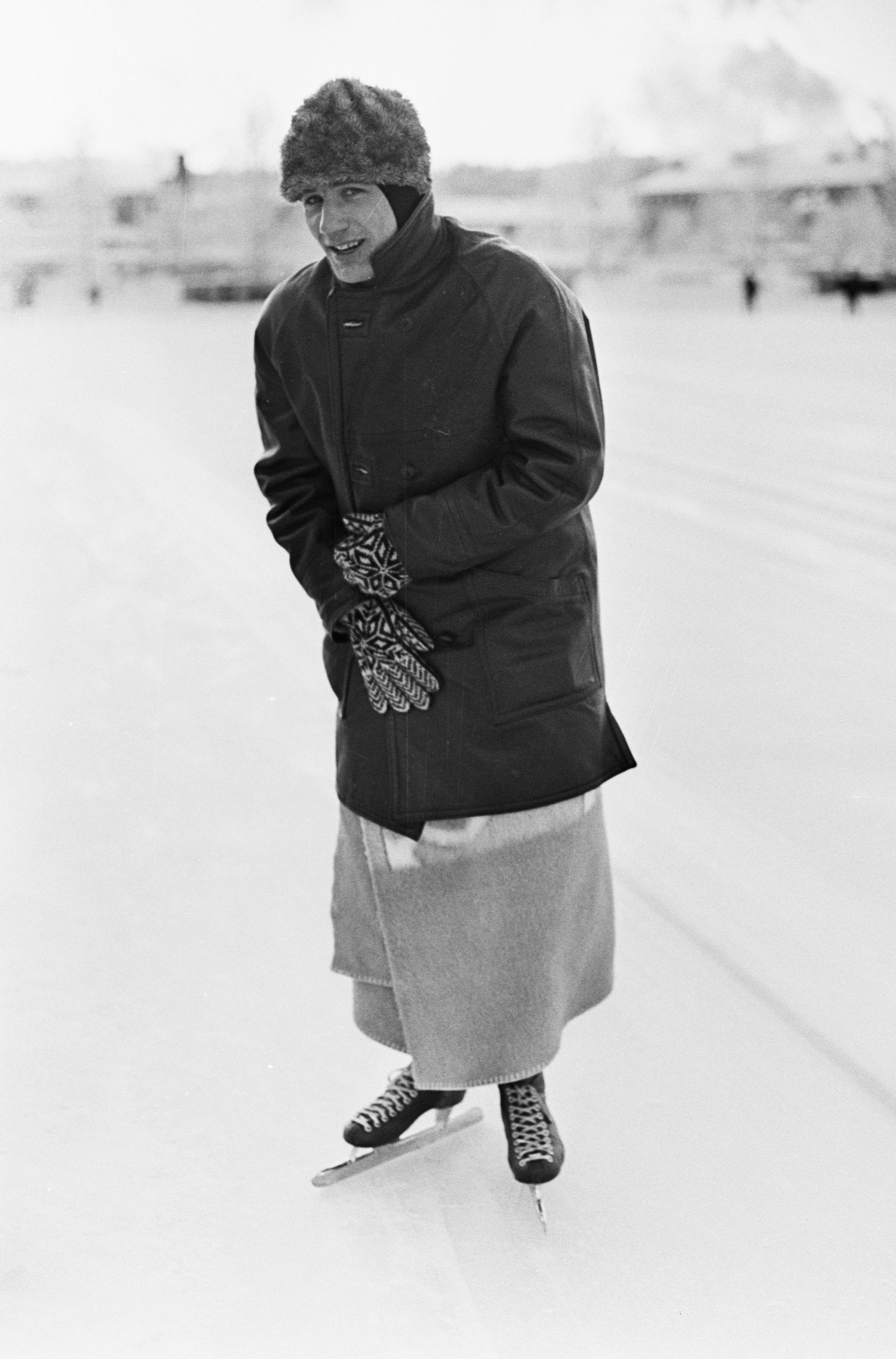 Collectie / Archief : Fotocollectie Anefo Reportage / Serie : [ onbekend ] Beschrijving : Europese Schaatskampioenschappen te Lathi, Finland, Kees Verkerk met deken om zich heen Datum : 29 januari 1967 Locatie : Finland Trefwoorden : SCHAATSKAMPIOENSCHAPPEN Persoonsnaam : Verkerk, Kees Fotograaf : Kroon, Ron / Anefo Auteursrechthebbende : Nationaal Archief Materiaalsoort : Negatief (zwart/wit) Nummer archiefinventaris : bekijk toegang 2.24.01.05 Bestanddeelnummer : 920-0243